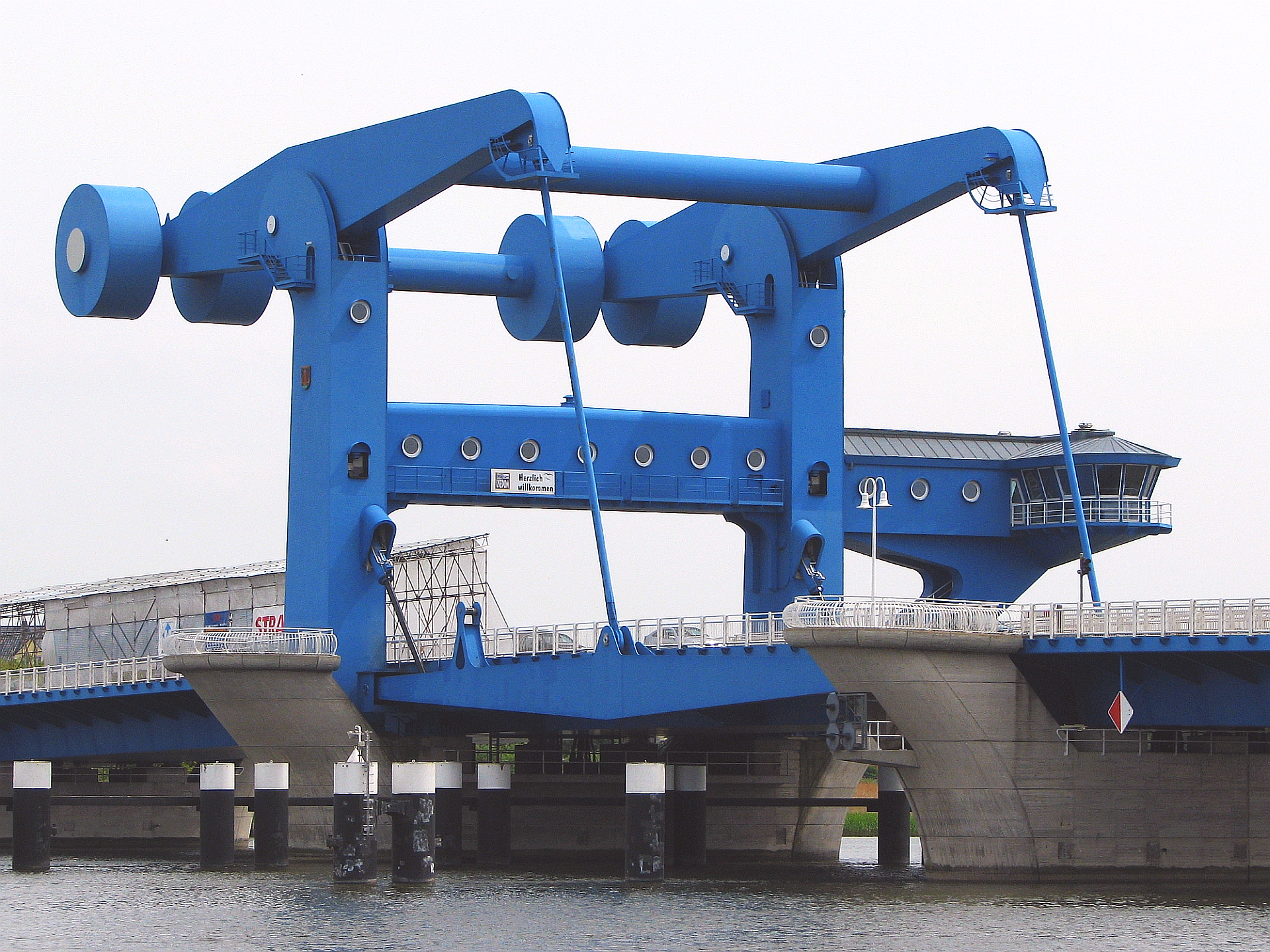 Wolgast Waagbalken-Klappbrücke fertiggestellt 1996 für Straße (B 111) und Schiene (Usedomer Bäderbahn) über den Peenestrom. Das Brückenauwerk mit insges. 247 m Länge wurde mit über 2.000 Konstruktionsstahl errichtet und besitzt eine Stahl-Brückenklappe mit 42 m Länge bei einer Breite von 19 m und . Mecklenburg-Vorpommern, Germany. Foto Wolfgang Pehlemann 2009 IMG_7659